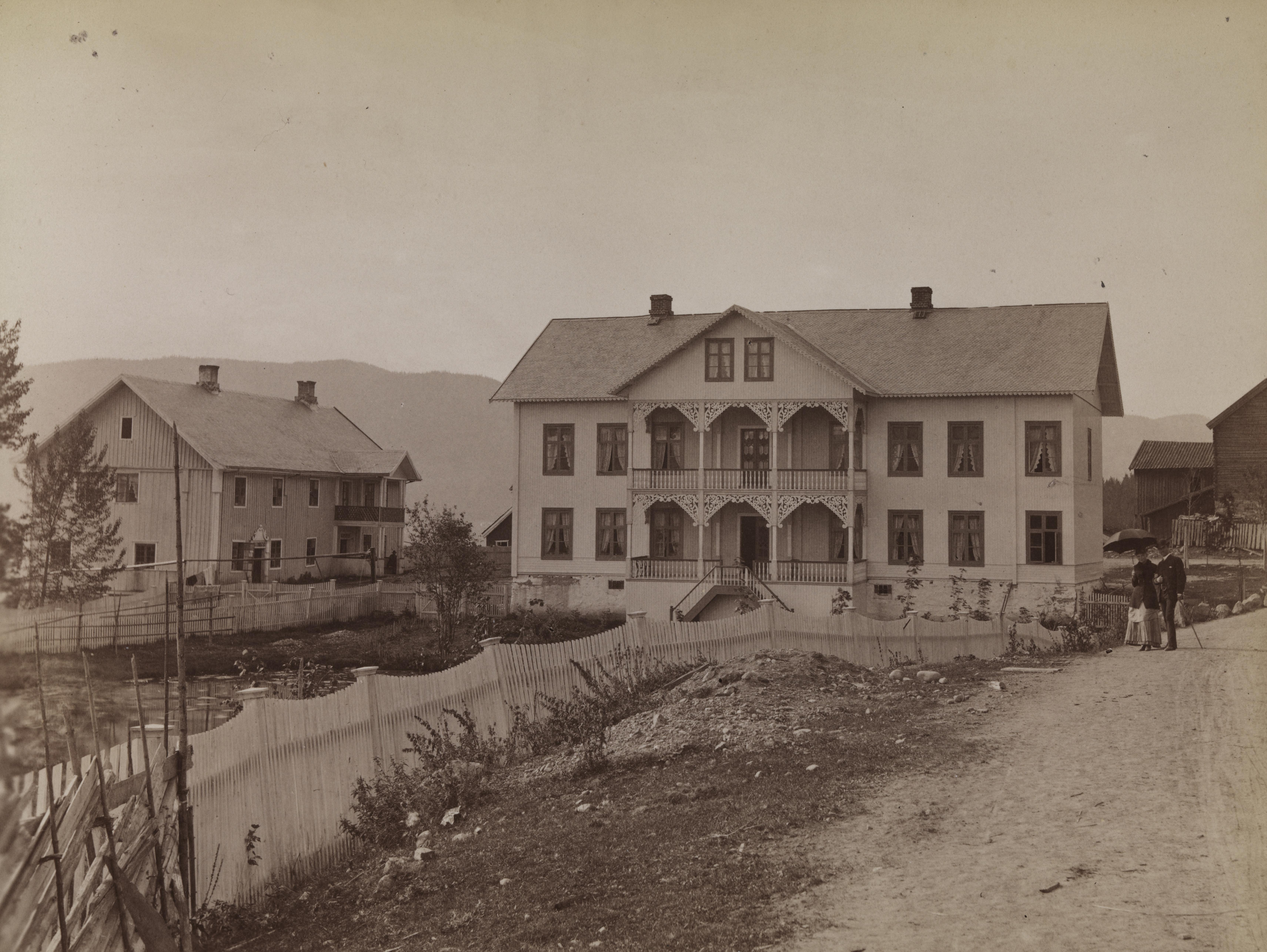 Sted: Odnes hotel Kommune: Søndre Land Fylke: Oppland Tagger: eksteriør fasader hoteller arkitekturfotografi landskapsfotografi